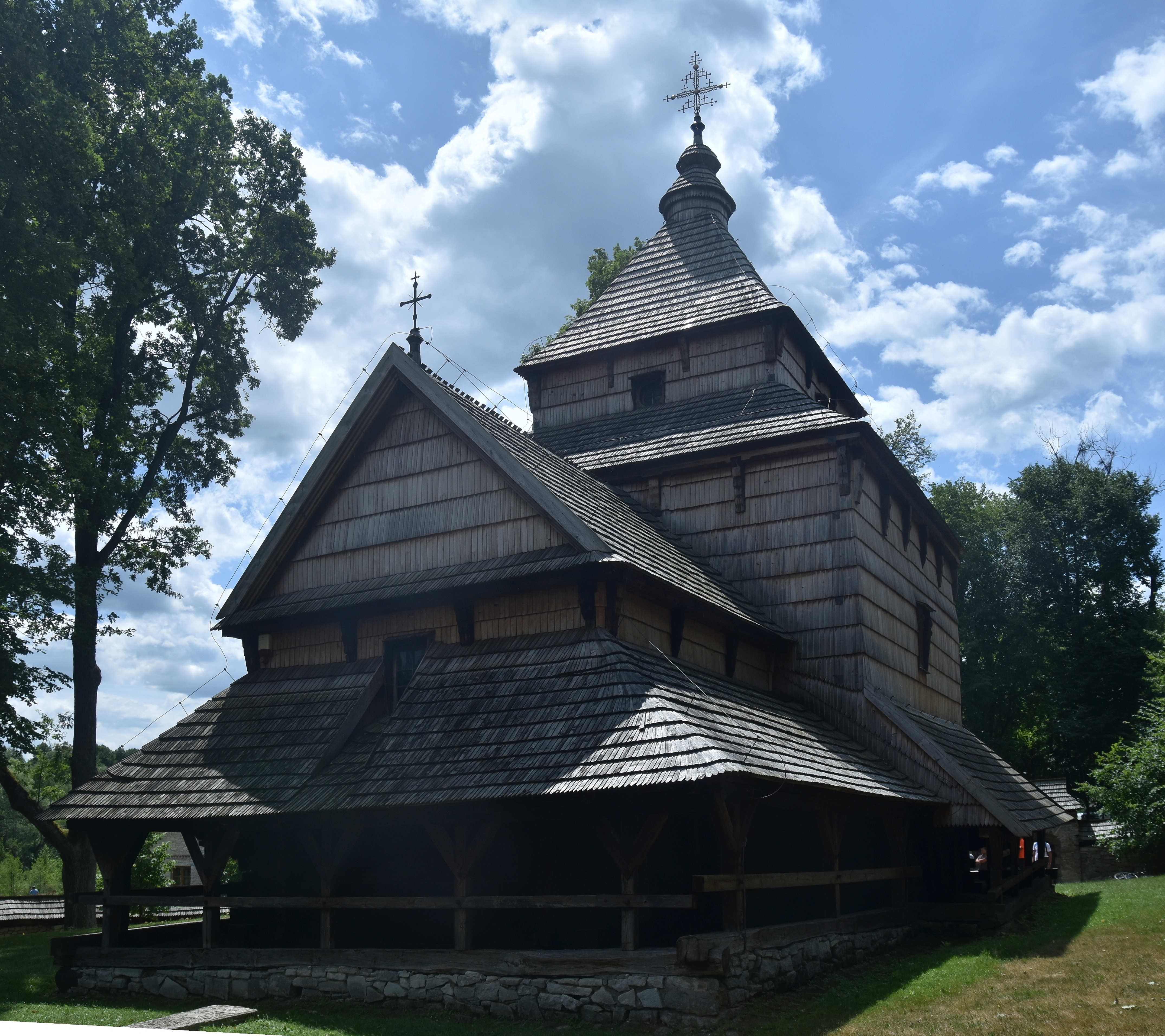 Radruż, Cerkiew św. Paraskewy w Radrużu